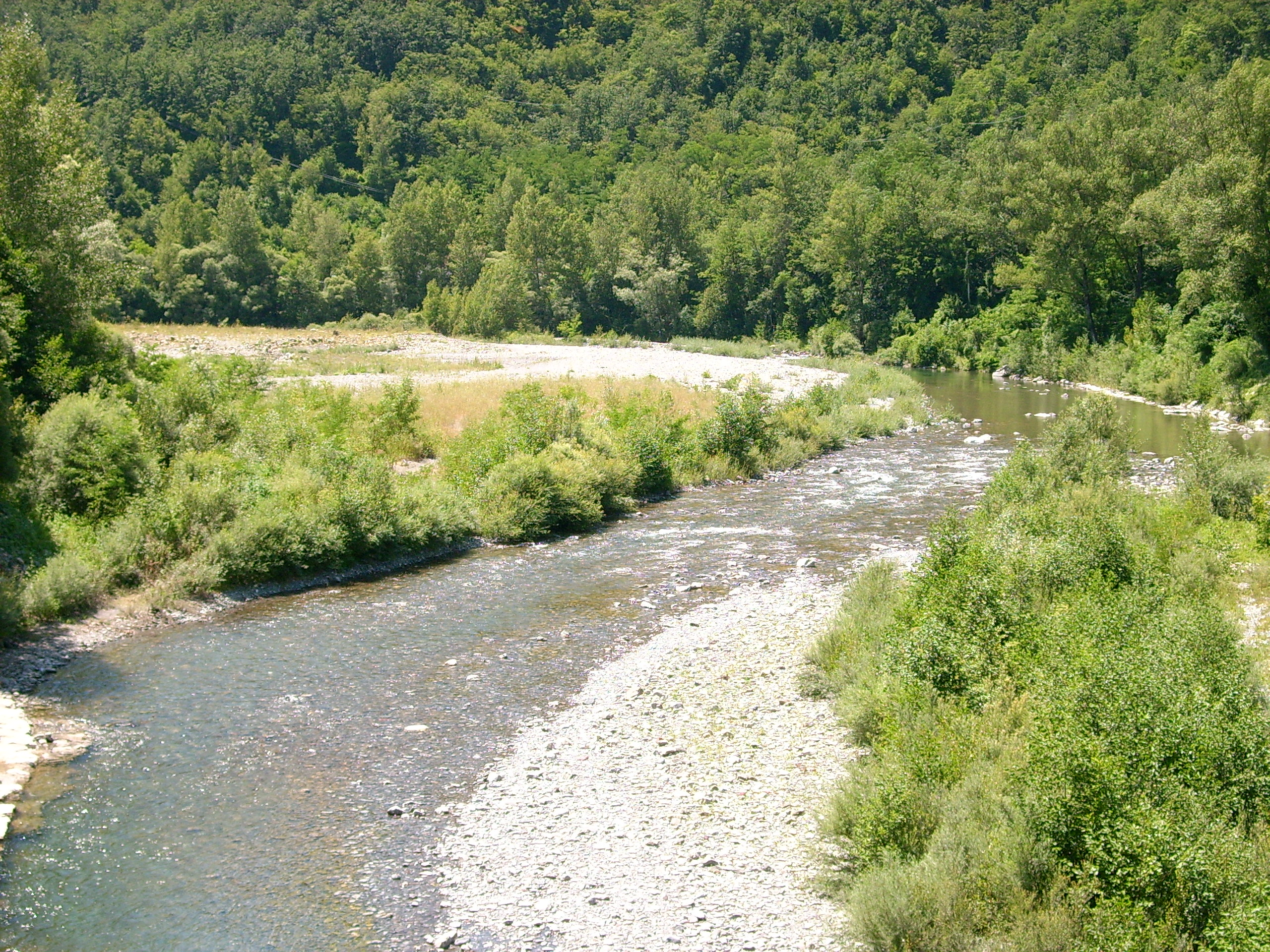 Il fiume Trebbia presso Gorreto, Liguria, Italia